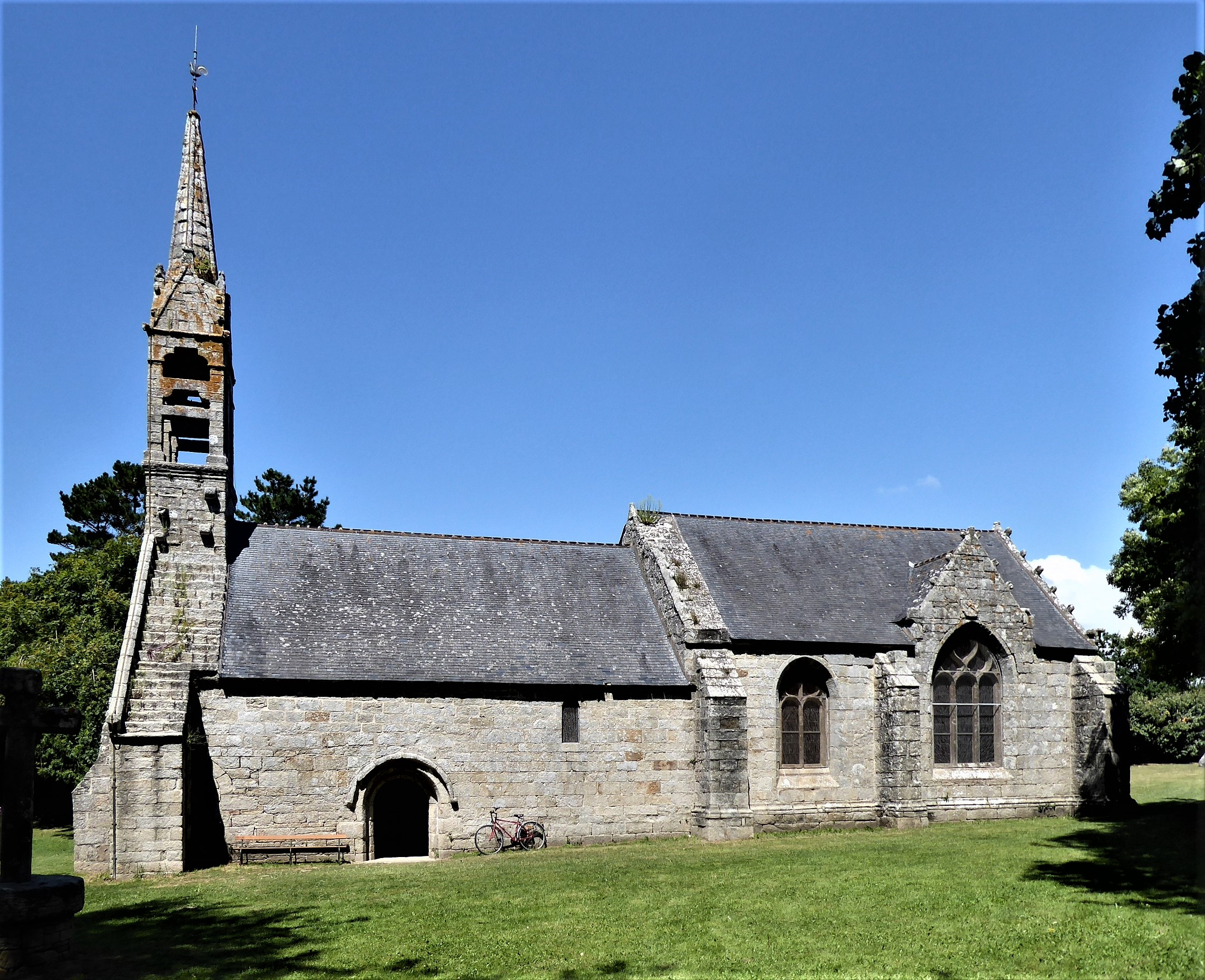 Chapelle Sainte-Marie-Madeleine de Penmarc'h